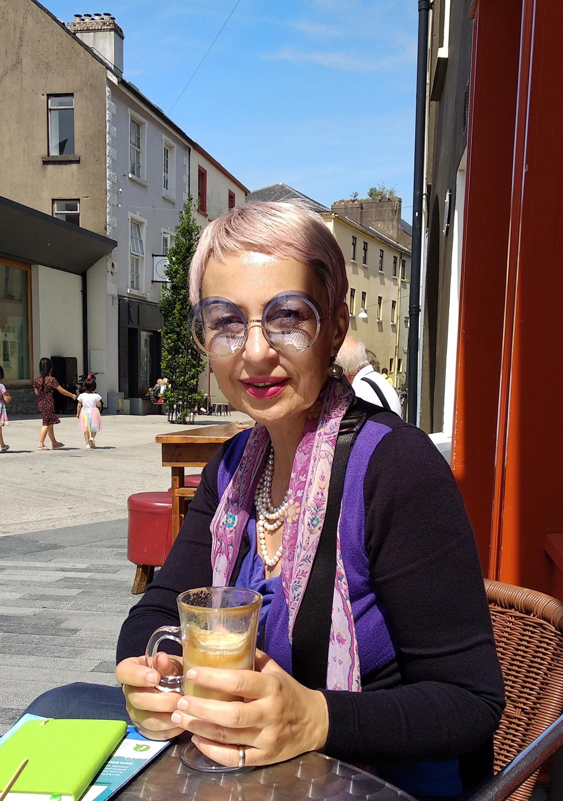 Fotografija hrvatske književnice Jasne Horvat.